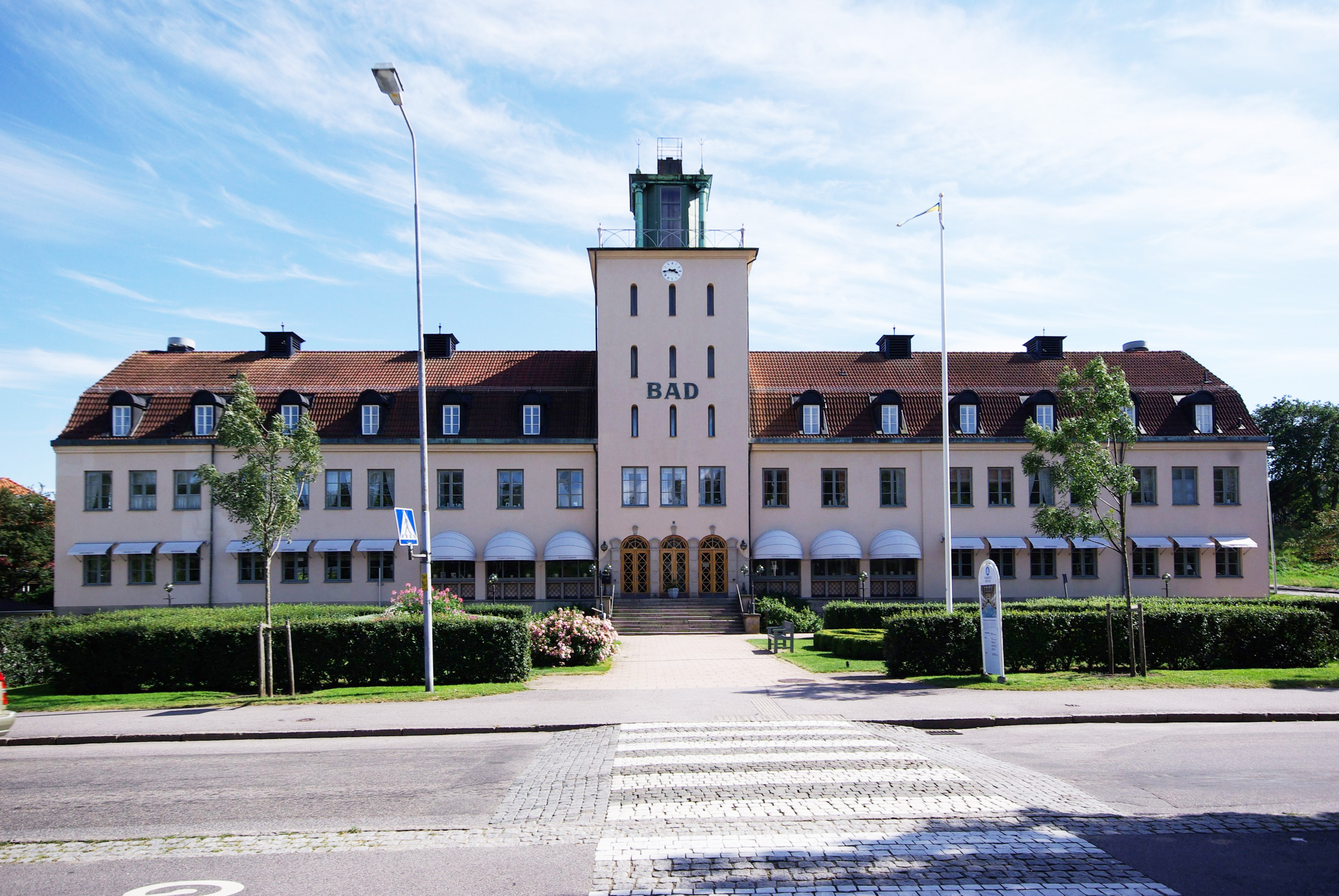 Varberg, Schweden, das Warmbadehaus in der Nähe der Festung. Das Haus beinhaltet auch eine Klinik.